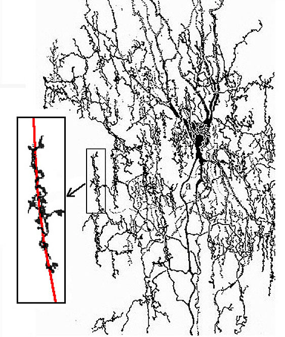 Célula en candelabro en la corteza visual del gato. El axon de esta célula (a) se resuelve formando una serie de segmentos verticales que hacen contactos sinápticos de tipo inhibidor sobre los segmentos iniciales de los axones (en rojo) de células piramidales (esquema a la izquierda de la imagen). Dibujo de una preparación teñida por el método de Golgi.